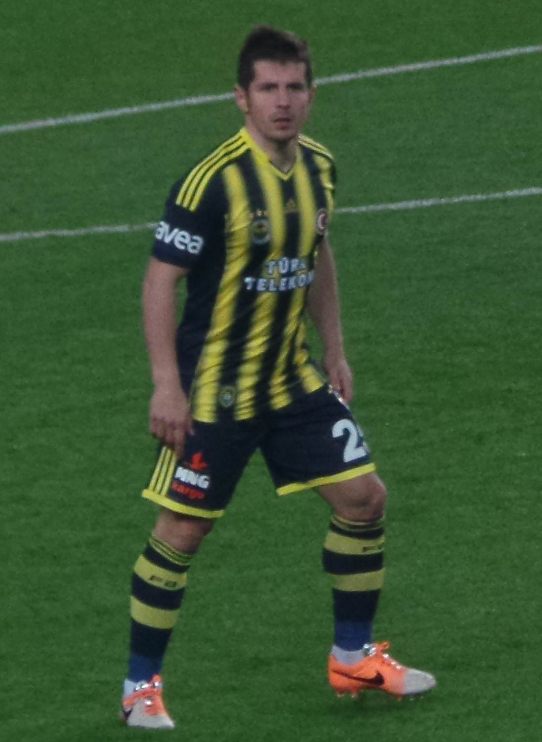 Emre Belözoğlu FB-Kasımpaşa